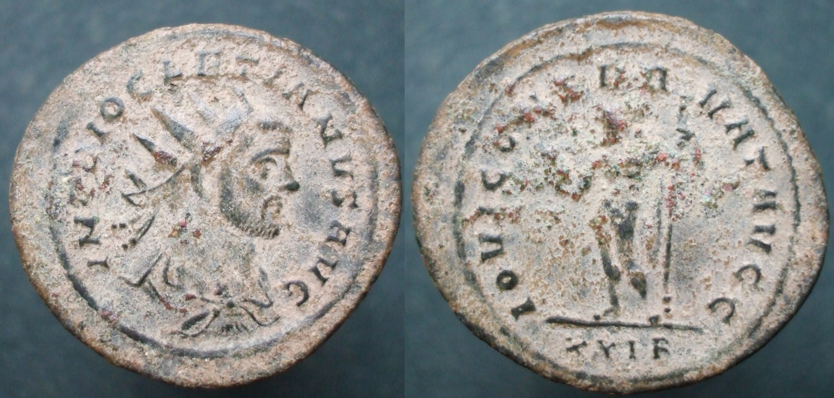 Monnaie romaine antoninien Dioclétien Jupiter IOVI CONSERVAT Lyon Tétrarchie